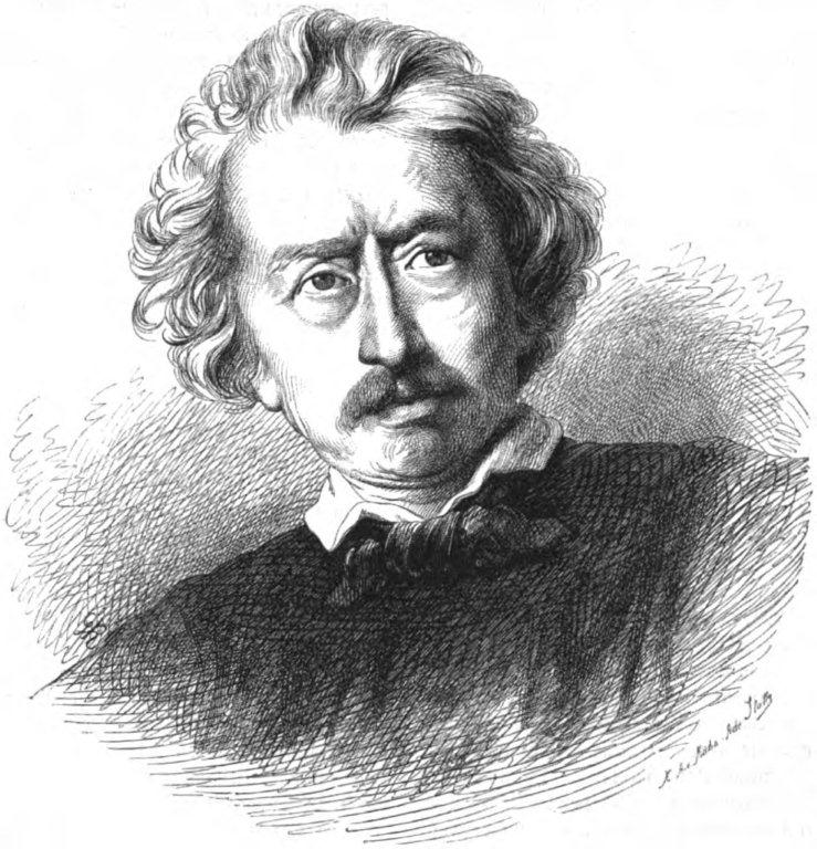 Ary Scheffer, französischer Maler niederländischer Herkunft im 19. Jh.